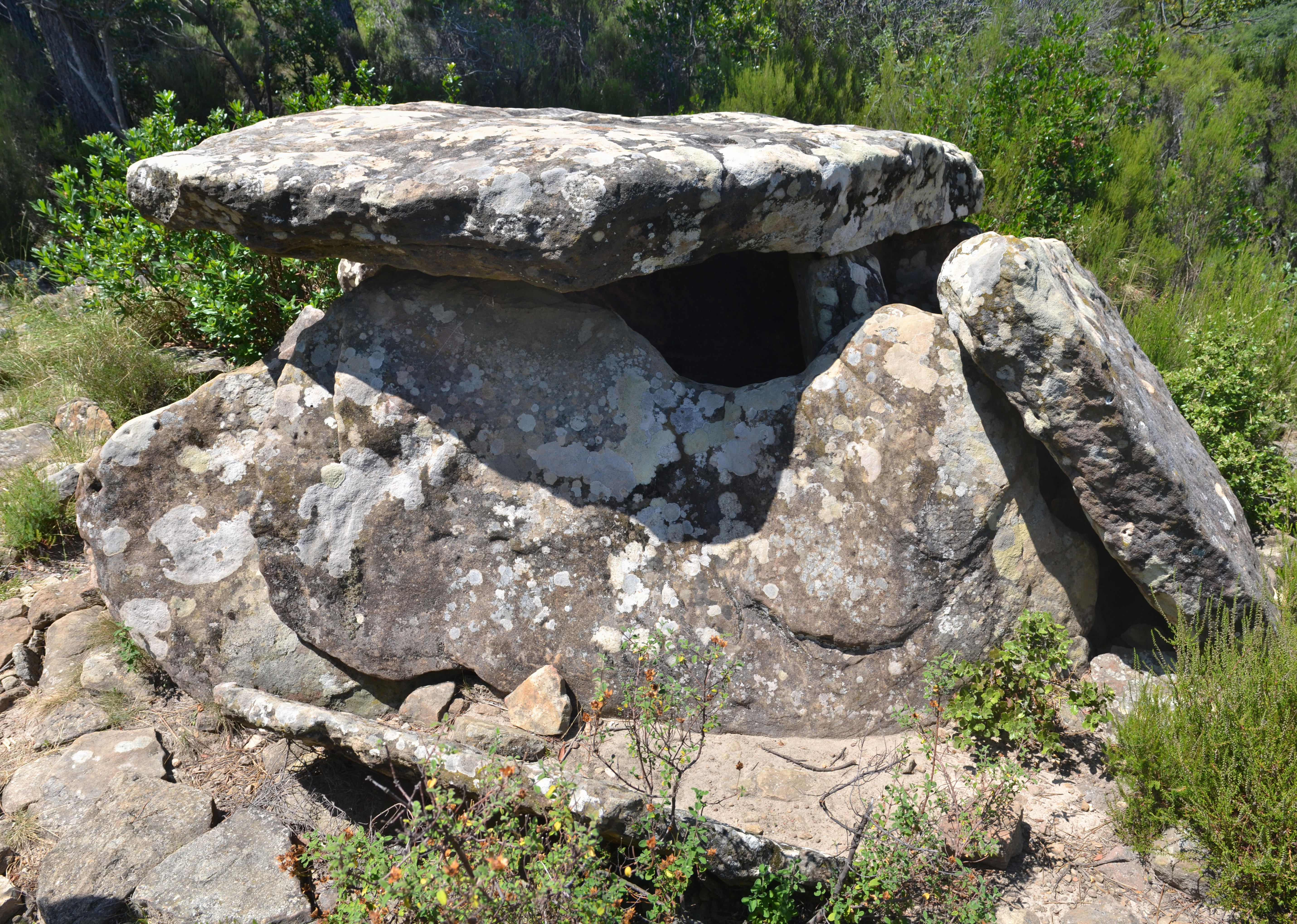 Dolmen de la Bruyère d'Usclas, Saint-Privat (34).